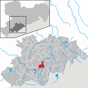 Schlettau im Erzgebirgskreis, Sachsen